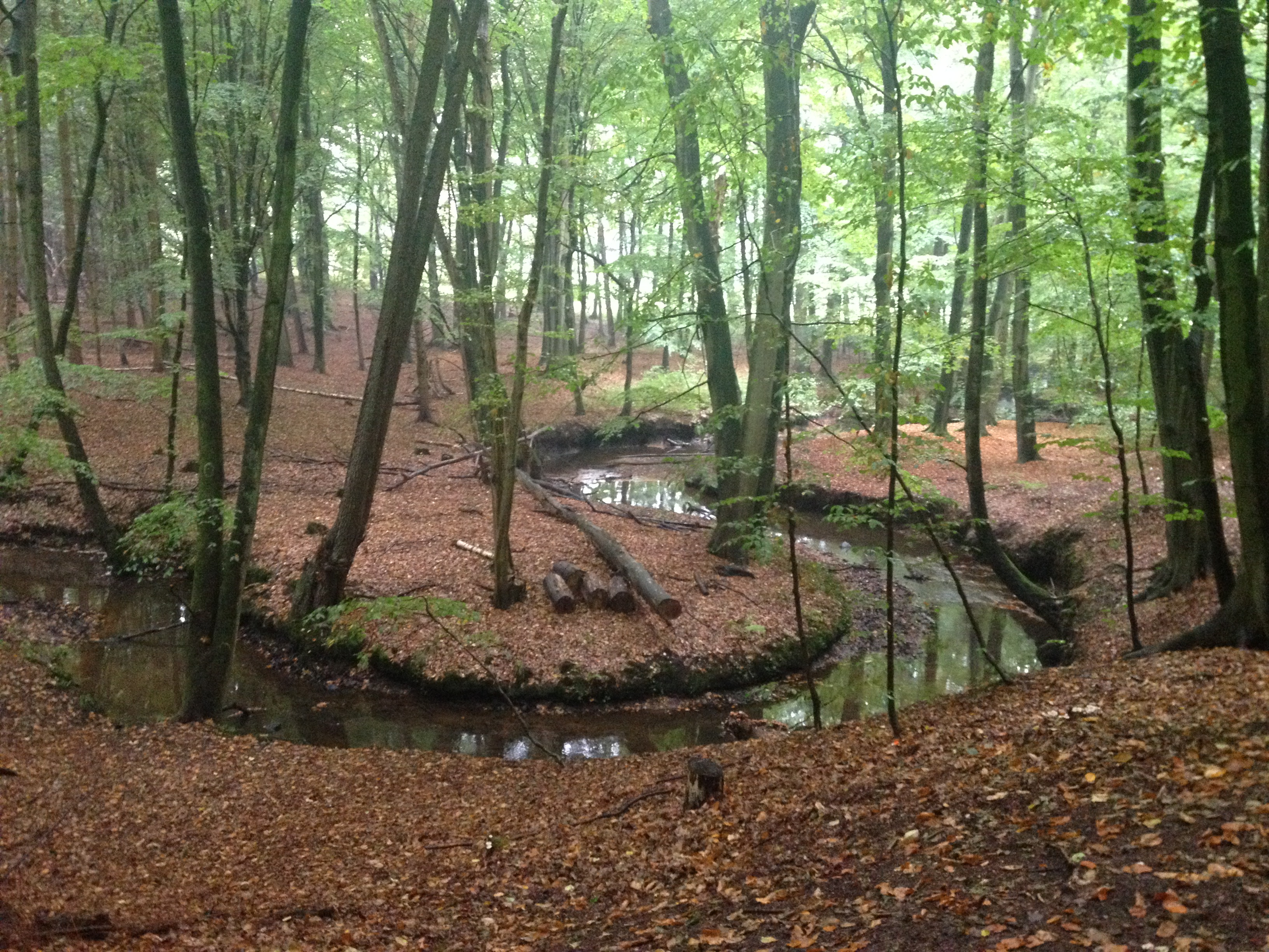 Steenbeek bi Rutenbeek un Harsfeld